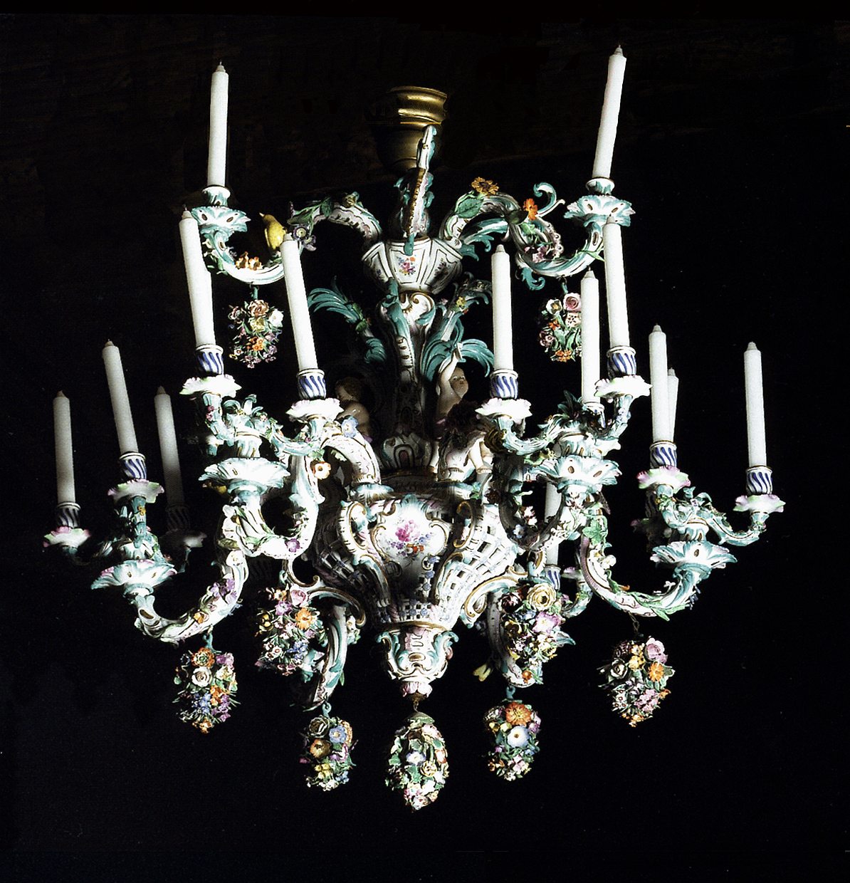 Dieser Kronleuchter aus Meißner Porzellan gehörte dem König Georg V. Er hing bis zum September 2005 in den Schauräumen von Schloss Marienburg. Dann wurde er bei Sotheby’s versteigert.